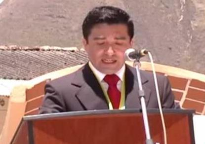 Alcalde Provincial de Chota